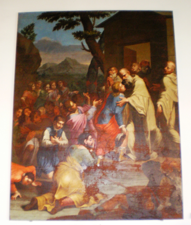 Tela di G Laudati esposta nel loggiato superiore del chiostro